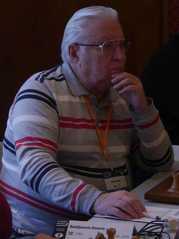 Evgeni Vasiukov, Schachweltmeisterschaft der Senioren 2016 in Marienbad.